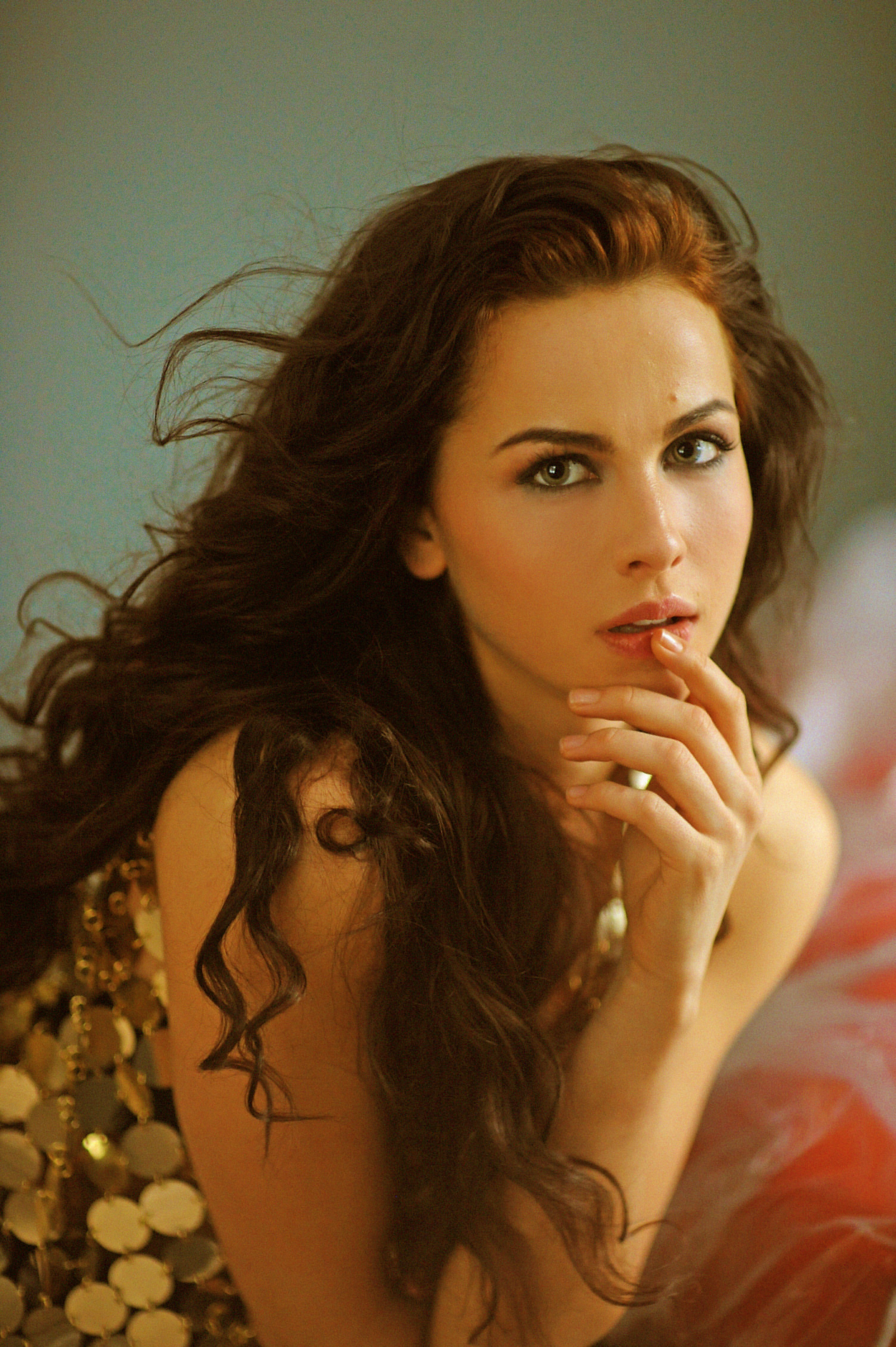 KHexEdit-0.8.6.png